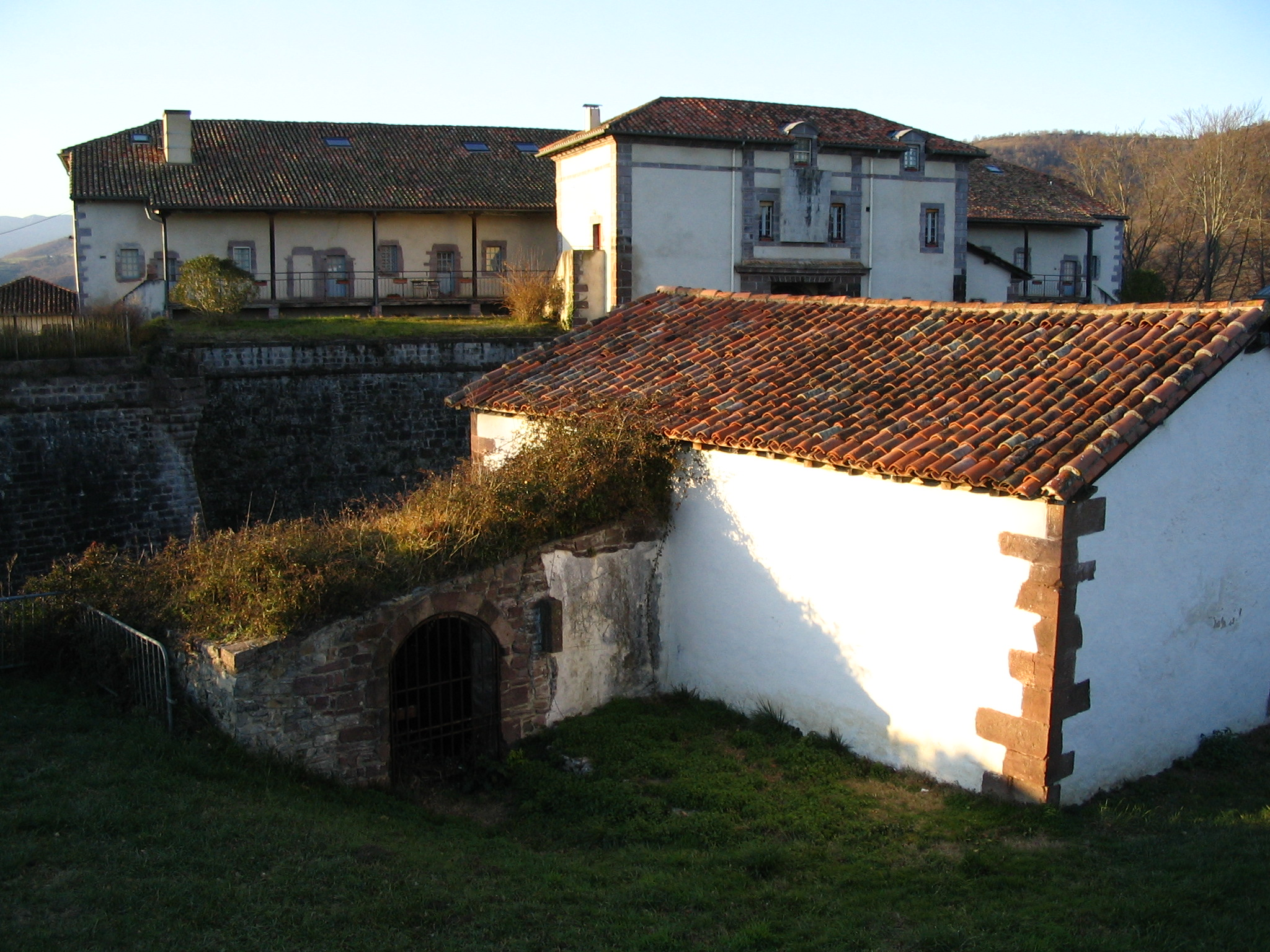 Citadelle - Saint-Jean-Pied-de-Port - Pyrénées Atlantiques Auteur/author: P.Charpiat - 2006